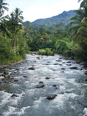 lake